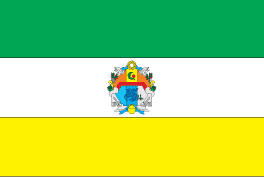 Прапор Пологівського району